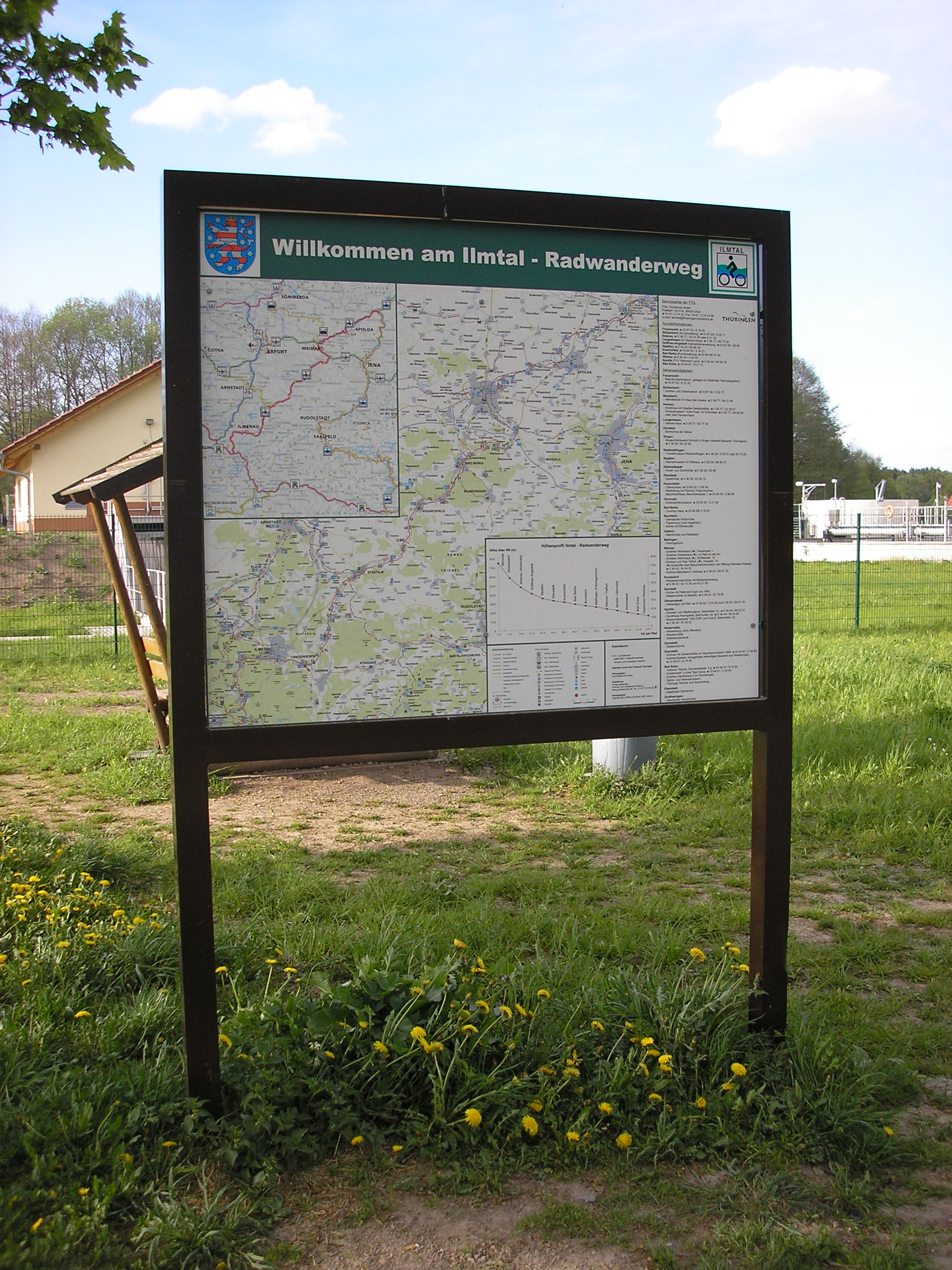 Eine Schautafel am Ilmradweg bei Langewiesen (Thüringen).